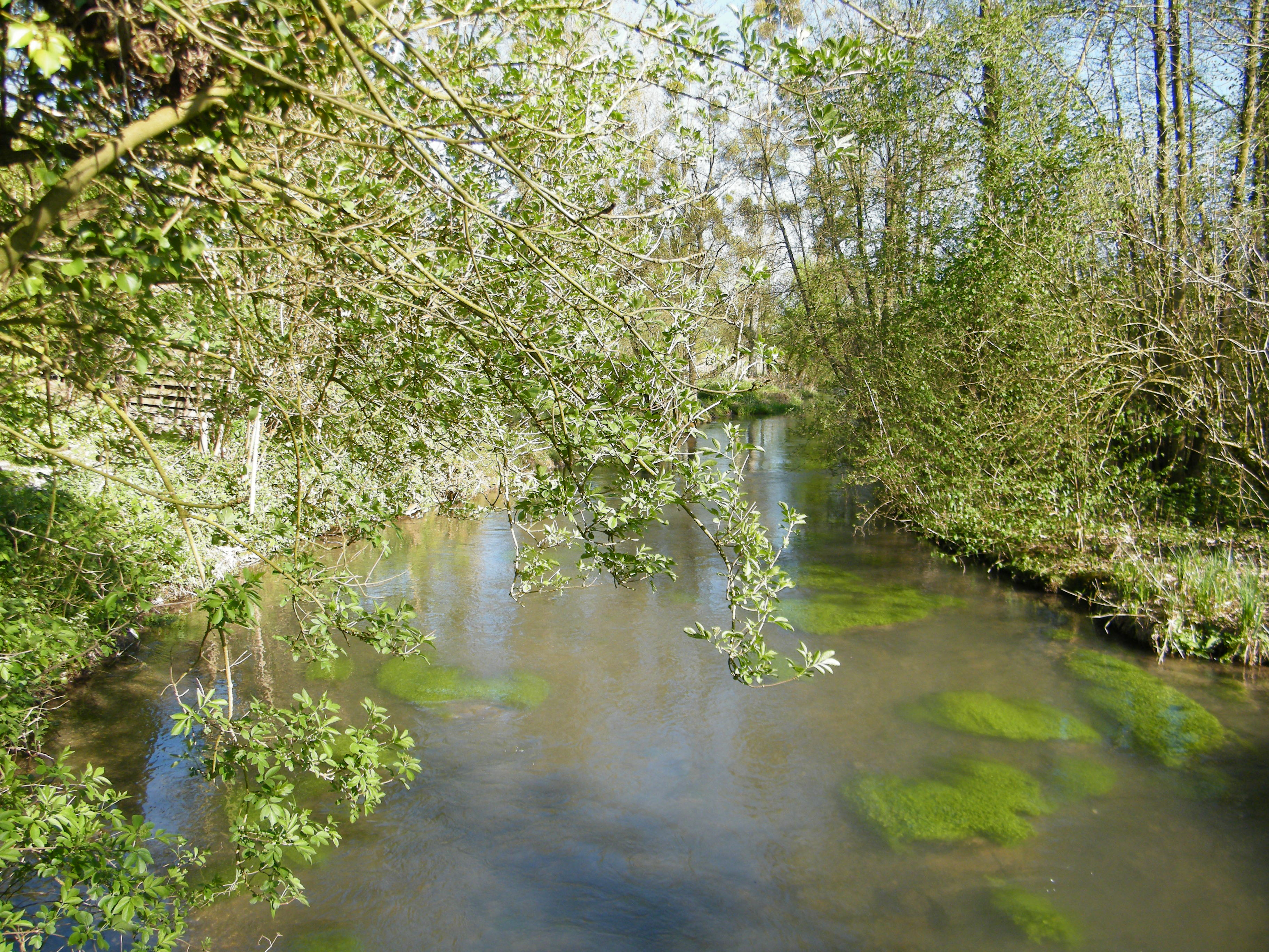 Le côté amont de la Bresle.